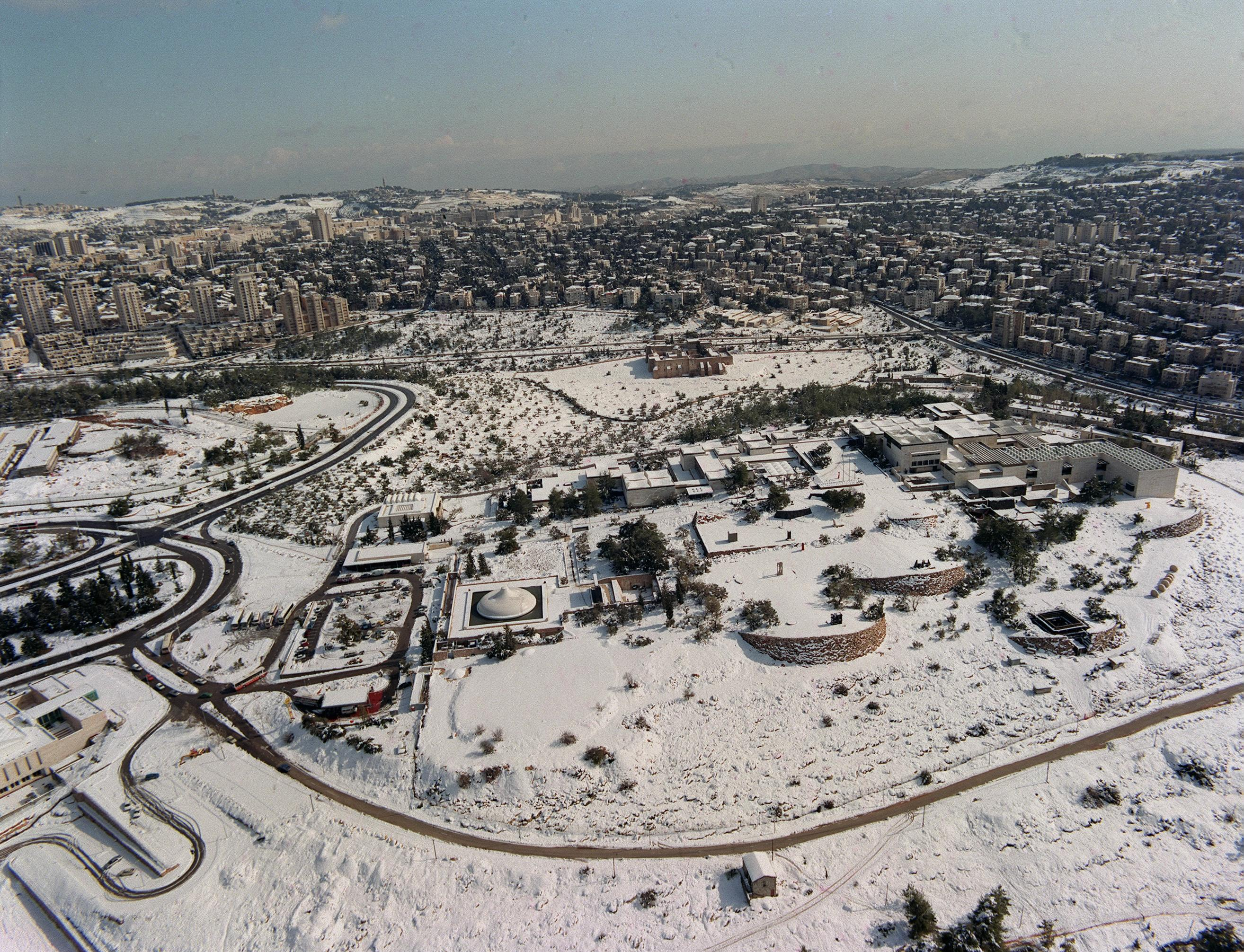 An aerial view of the Israel Museum in Jerusalem, under a blanket snow. שלג בירושלים. צילום אויר של מוזיאון ישראל בירושלים, תחת מעטה שלג כבד.